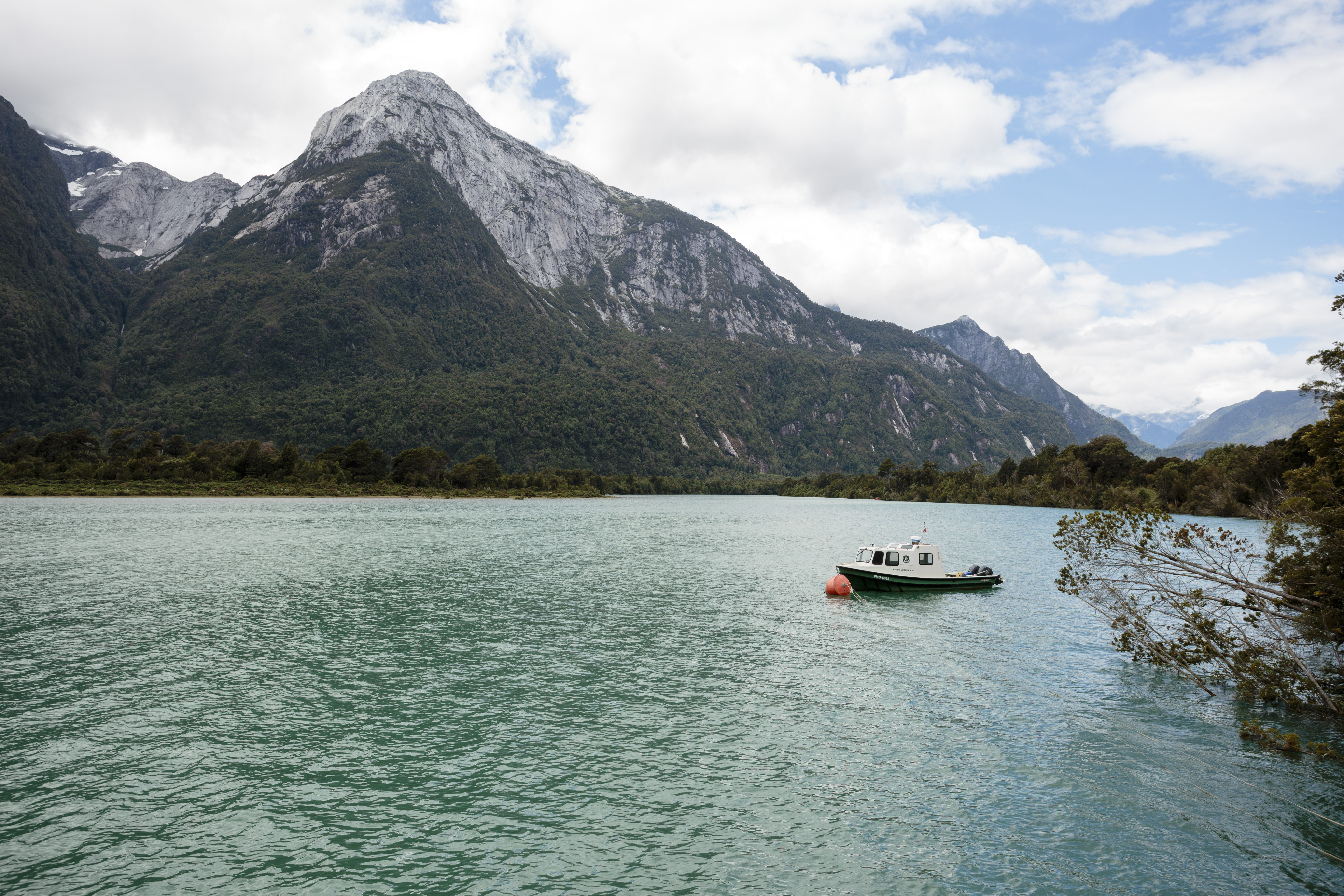 hualaihué